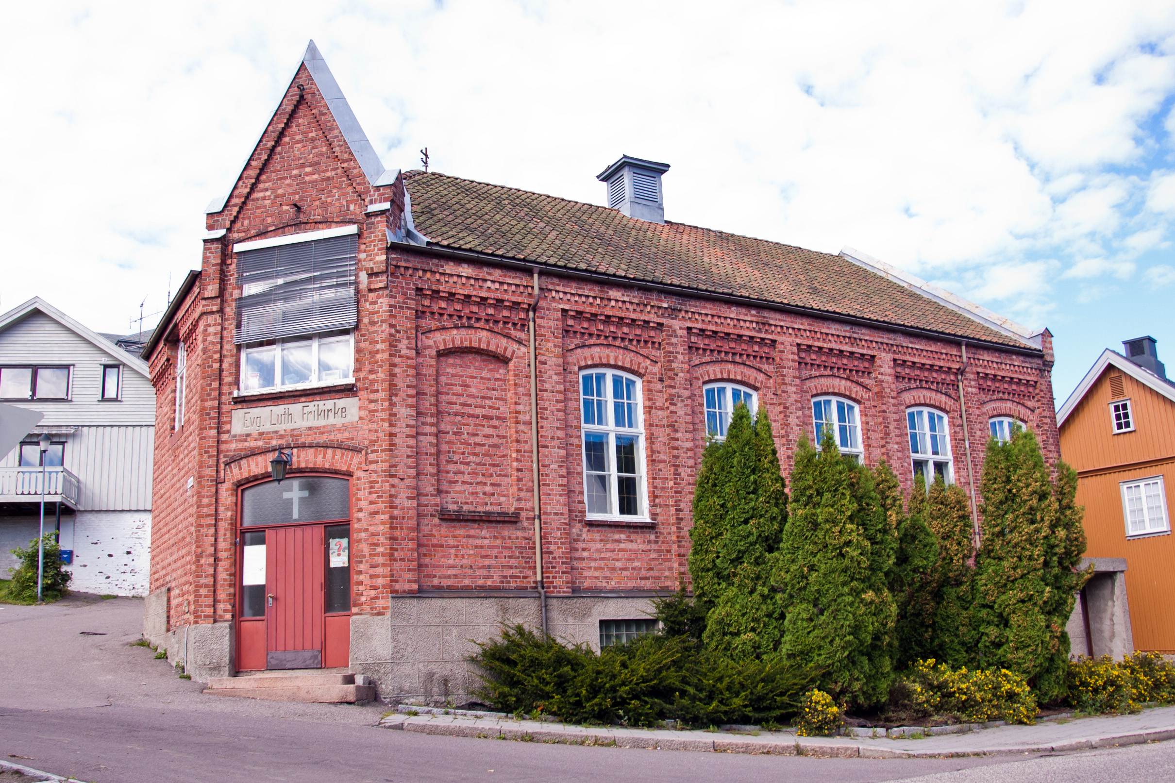 Den evangelisk-lutherske frikirke, "Frikirken" i Tønsberg